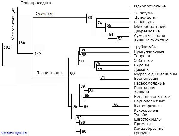 Филогенетическое дерево (хронограмма) 28 современных отрядов млекопитающих. Цифры показывают ориентировочное время расхождения филогенетических групп по данным молекулярной филогенетики ( млн. лет, округлено). Ветвь китообразных показана тонкой боковой линией, так как парнокопытные с исключёнными китообразными превращаются в парафилетическую группу